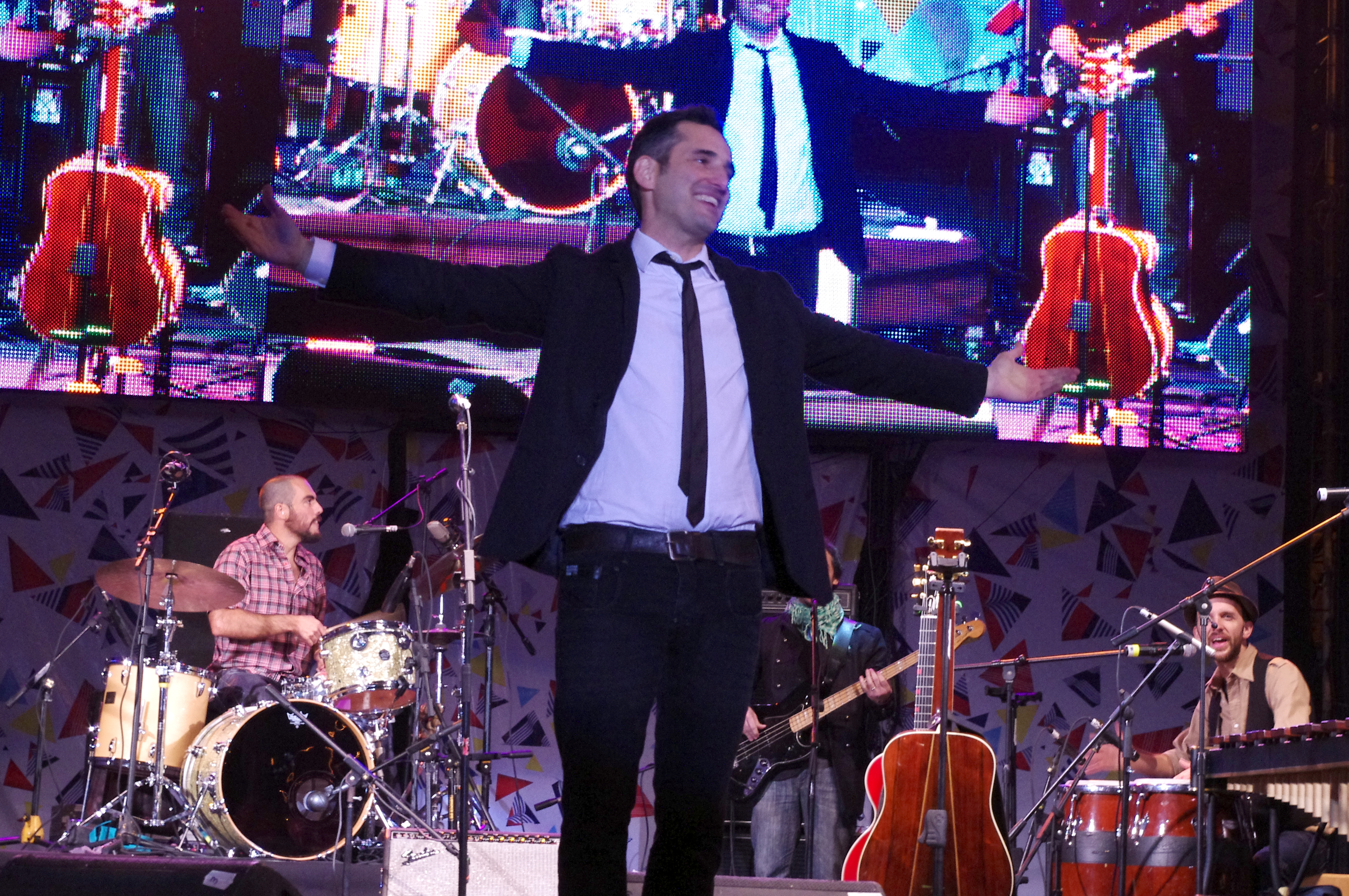 El músico uruguayo Jorge Drexler, brindando un concierto en el escenario del gaucho (intersección de las Calles 18 de Julio y Constituyente, Montevideo), en el marco de los festejos en Bicentenario en Uruguay.